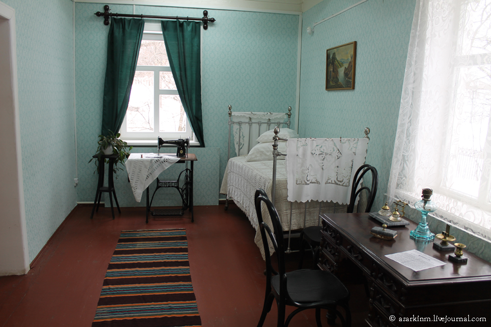 Дом-музей І з'езда РСДРП. Інтэр'ер.